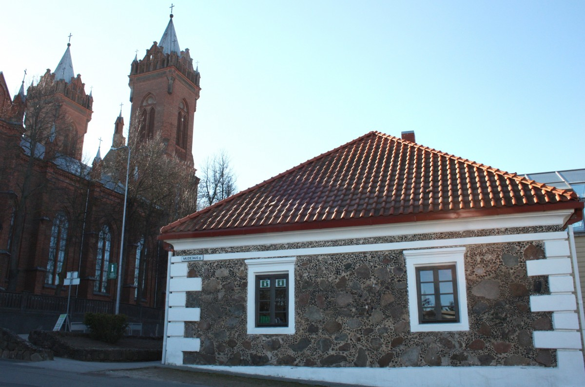 Kupiškio etnografijos muziejus